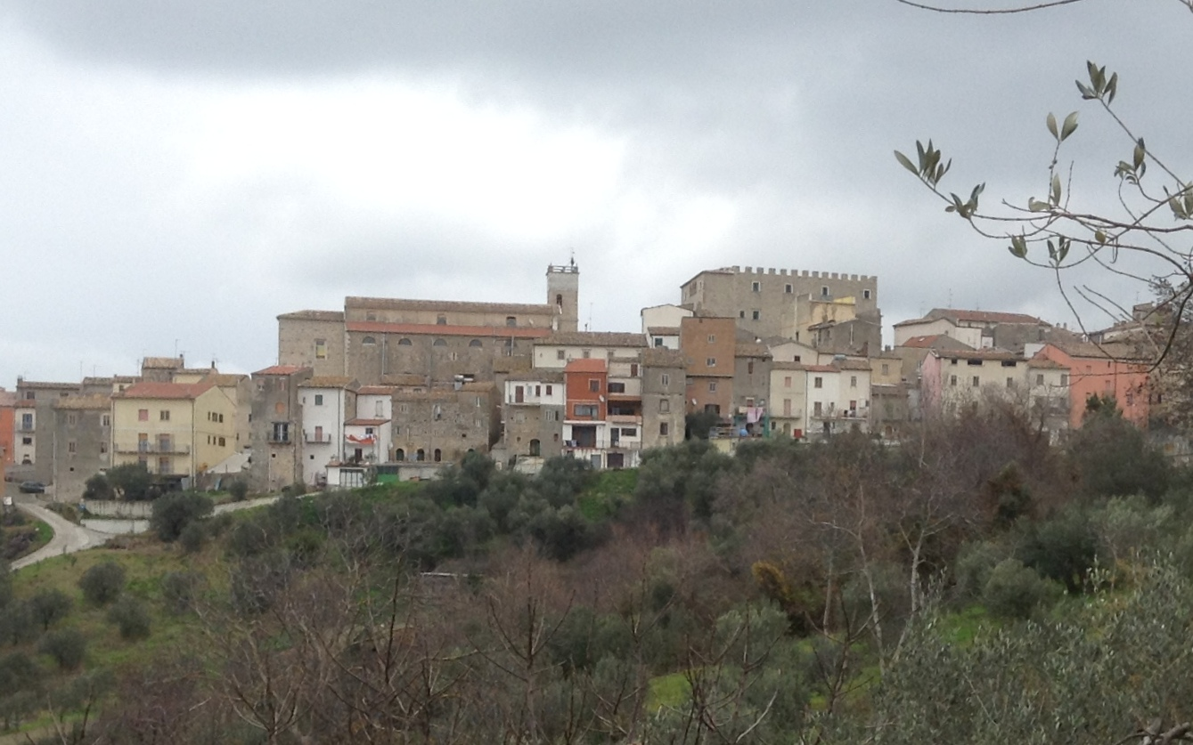 Comune di Gambatessa, chiesa e castello